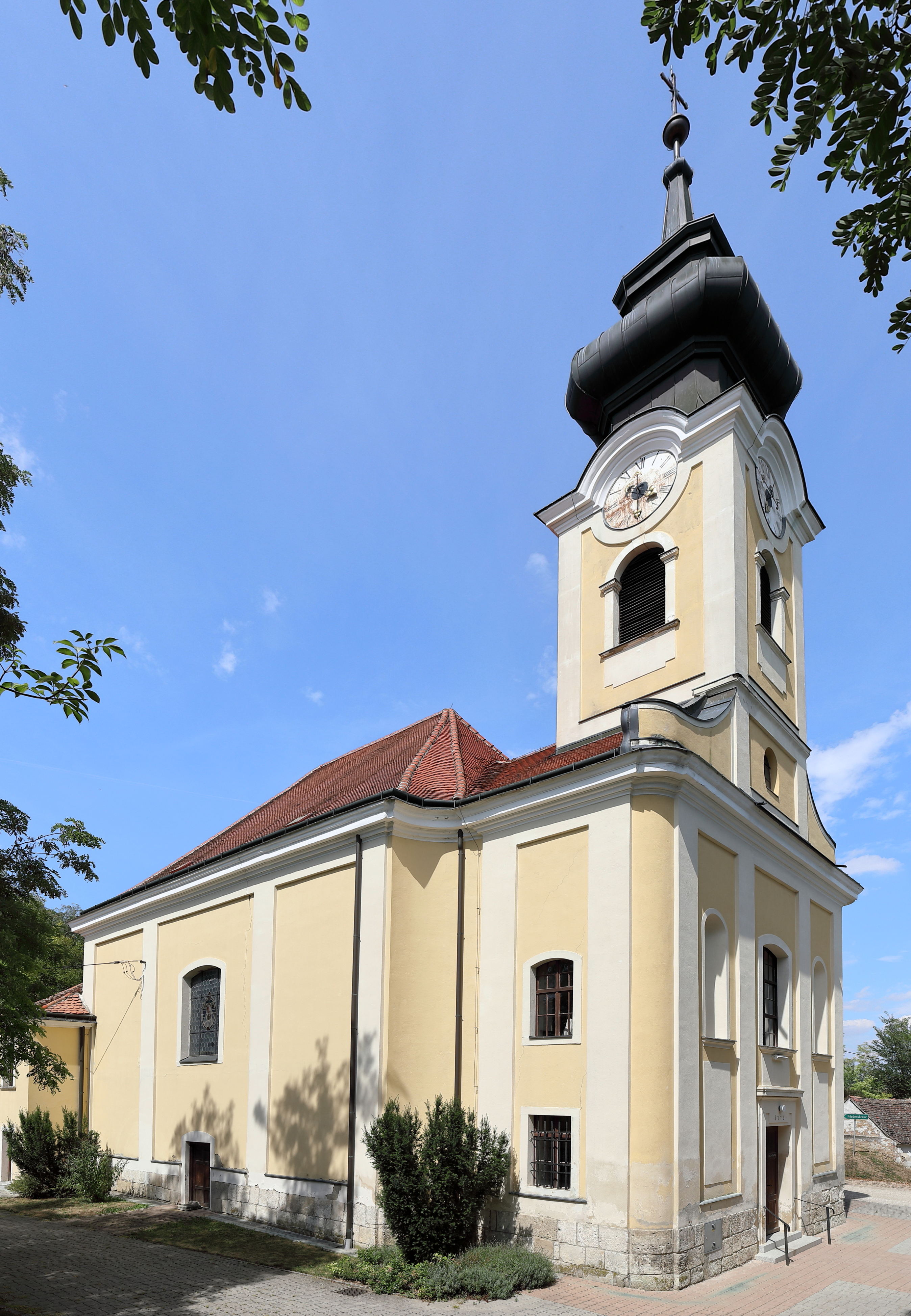 Südansicht der röm.-kath. Pfarrkirche hl. Andreas in der niederösterreichischen Marktgemeinde Ladendorf. Der spätbarocke Sakralbau mit Fassadenturm wurde 1766 nach Plänen von Peter Mollner errichtet.